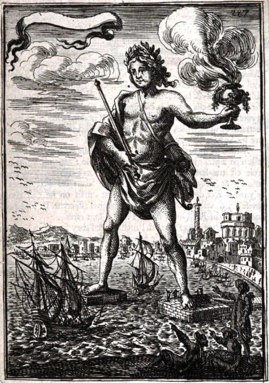 Colosse de Rhodes